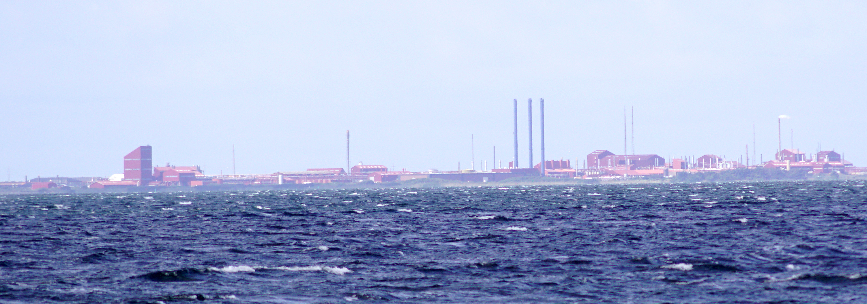 Cheminova set Gjeller Odde mod sydøst